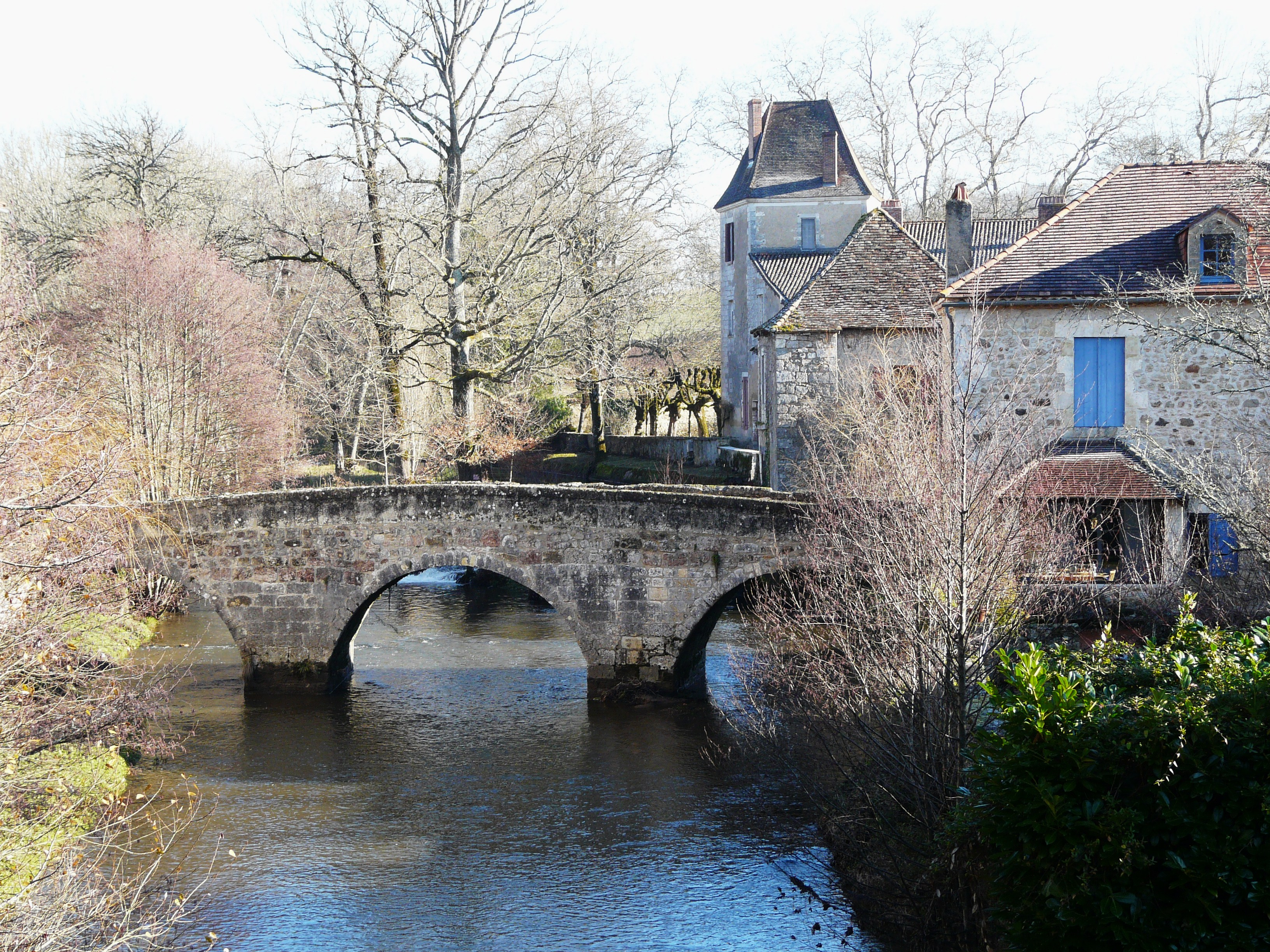 Le vieux pont et l'ancien prieuré, Saint-Jean-de-Côle, Dordogne, France Object location45° 25′ 18.8″ N, 0° 50′ 12.9″ E .